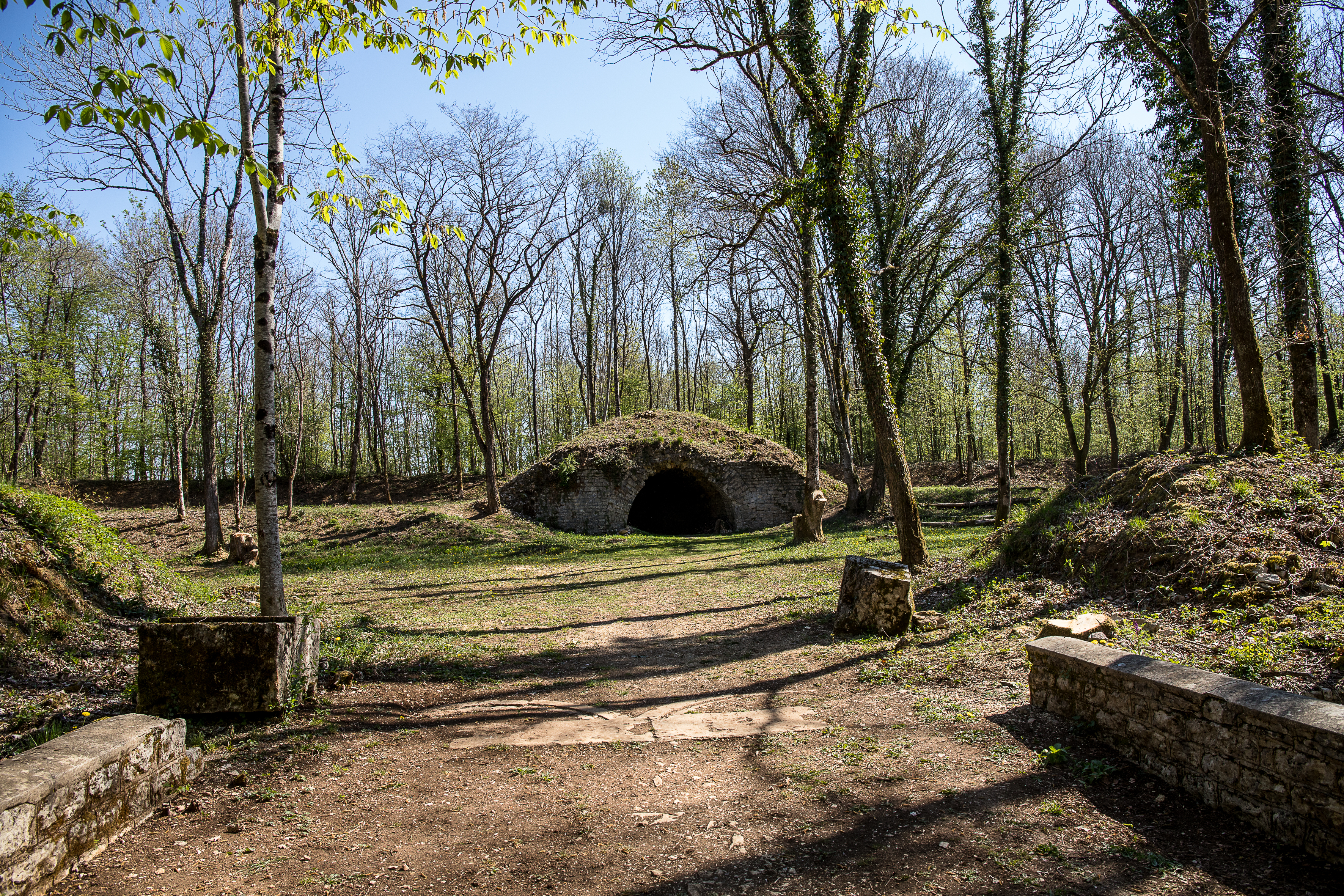 Vestiges de la batterie des Epesses sur la commune de Montfaucon (Doubs).